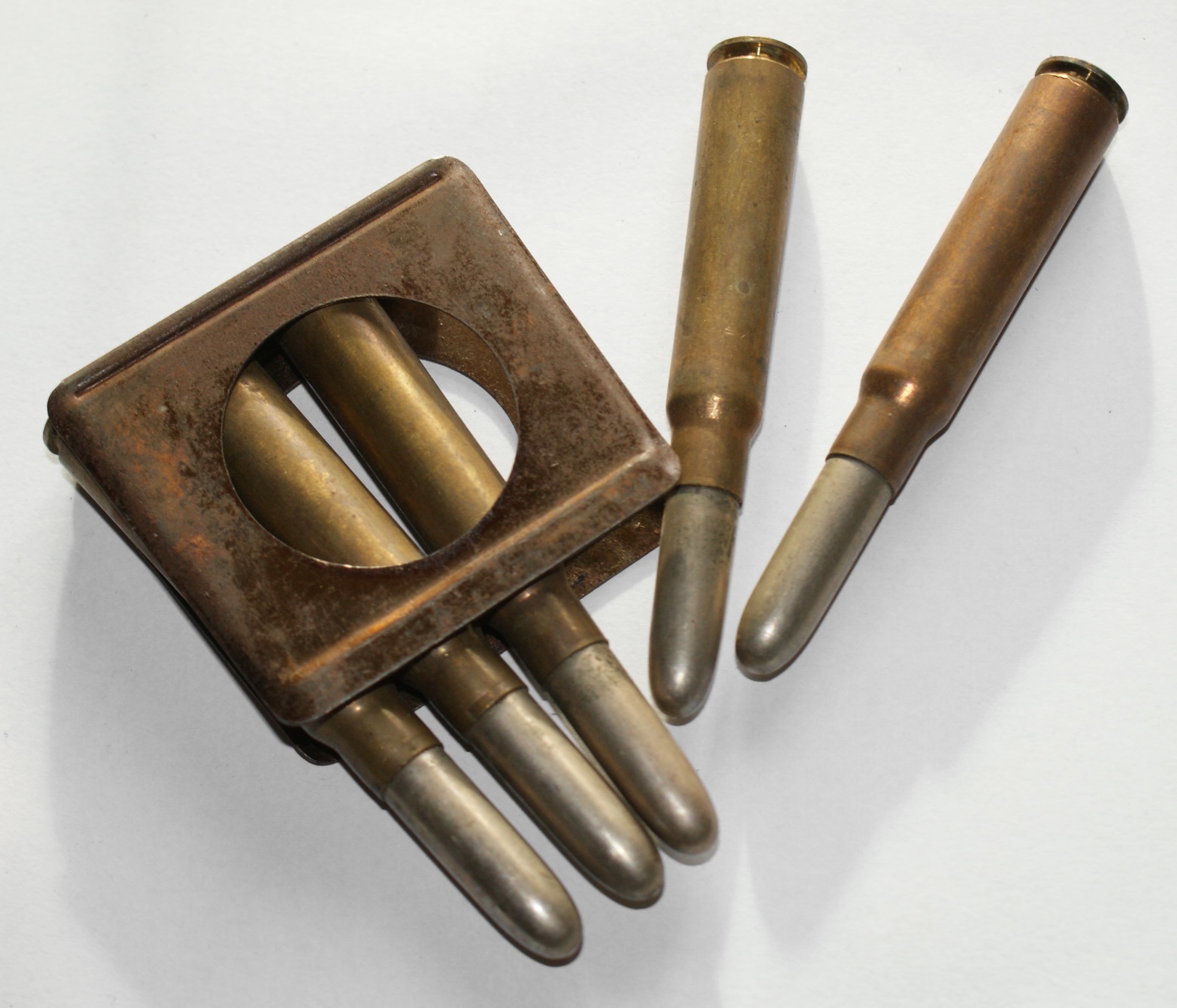 A clip for the Mauser Rifle 88 (WWI)